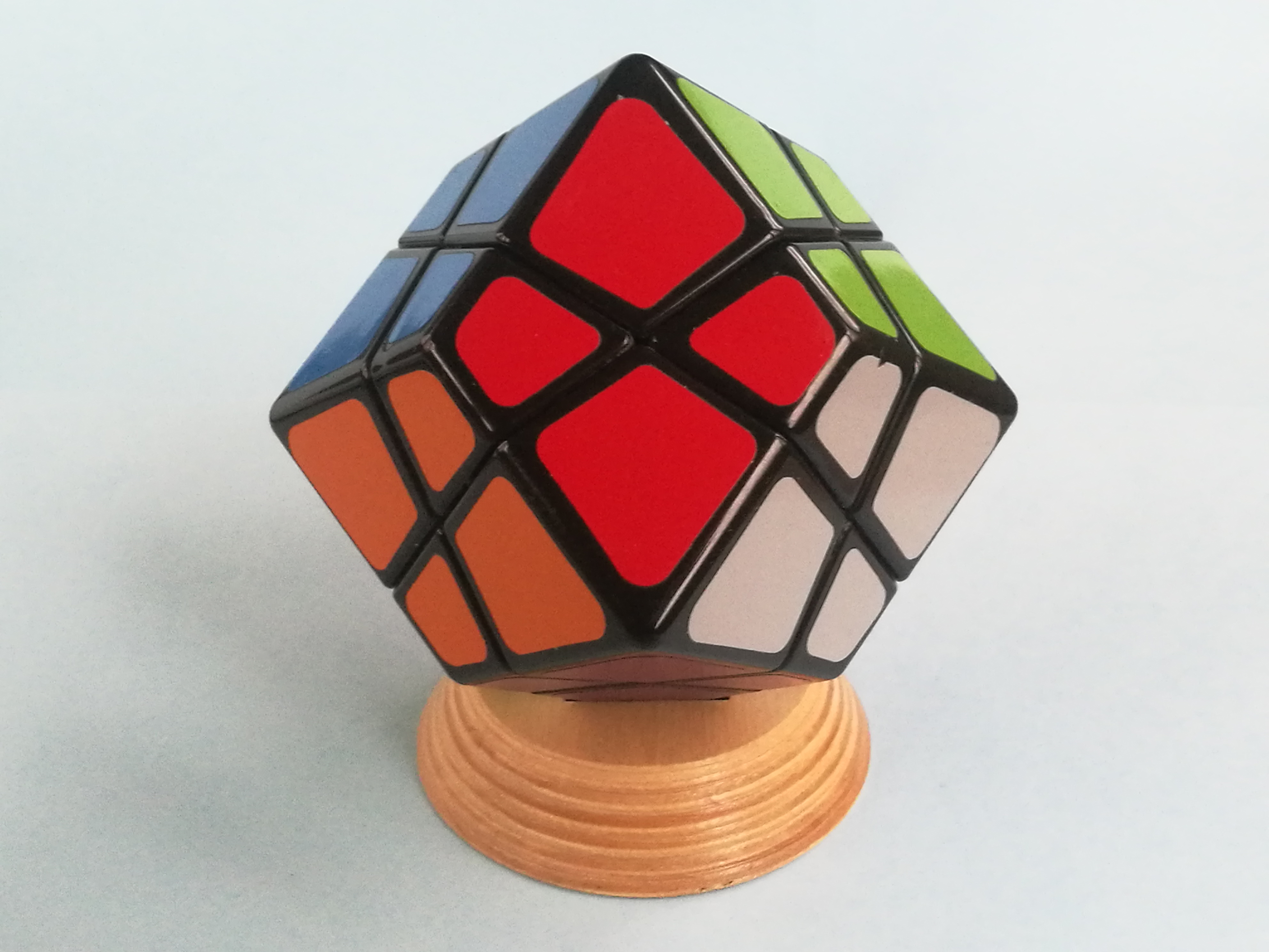 Nagy gránát - négytengelyes Rubik-kocka szerű játék